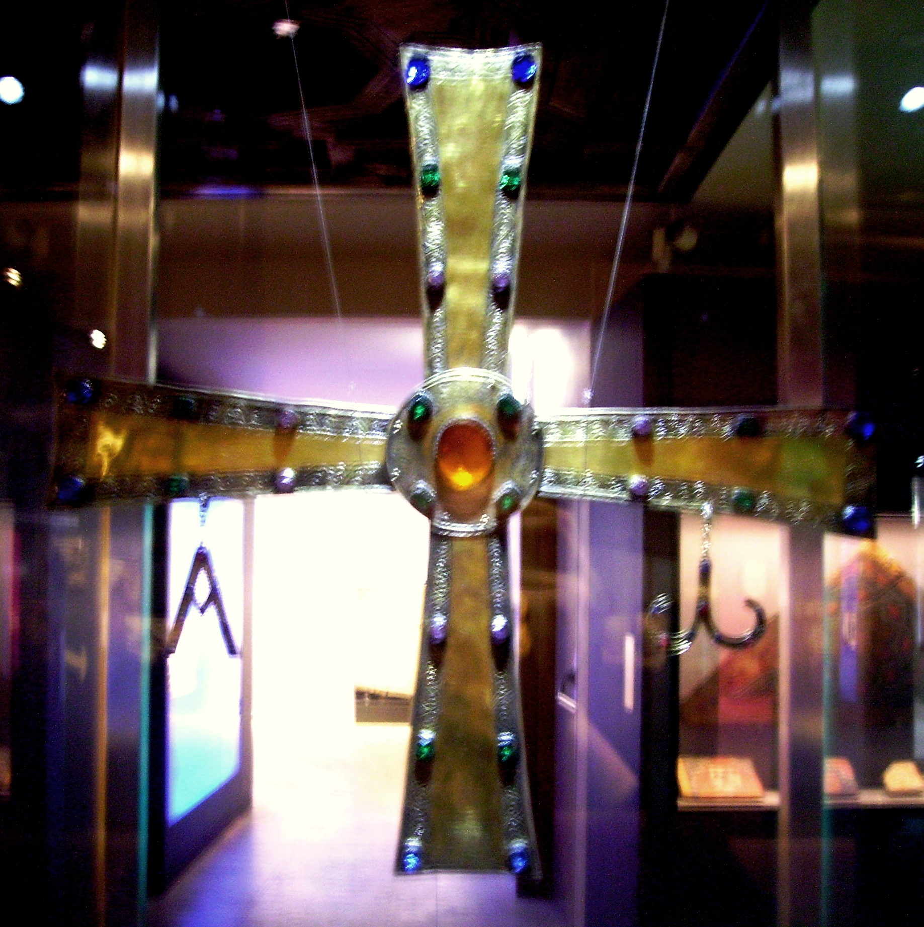 Cruz de Santiago de Peñalba. Simbolo de El Bierzo, León, Castilla y León, España.